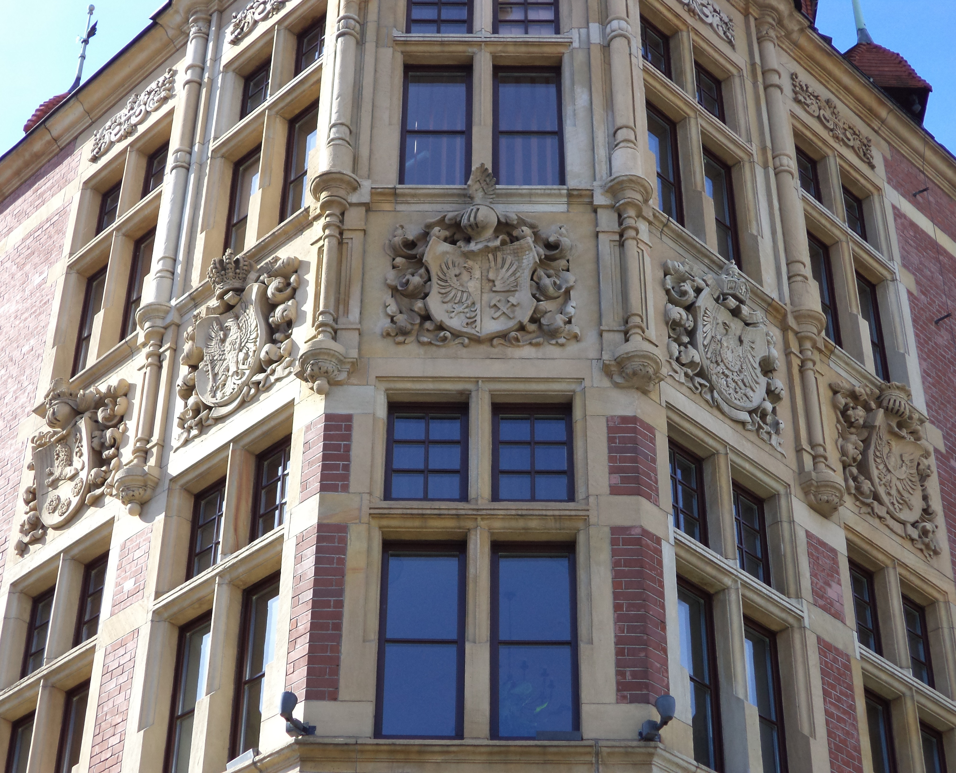 Herby na fasadzie budynku ratusza w Tarnowskich Górach